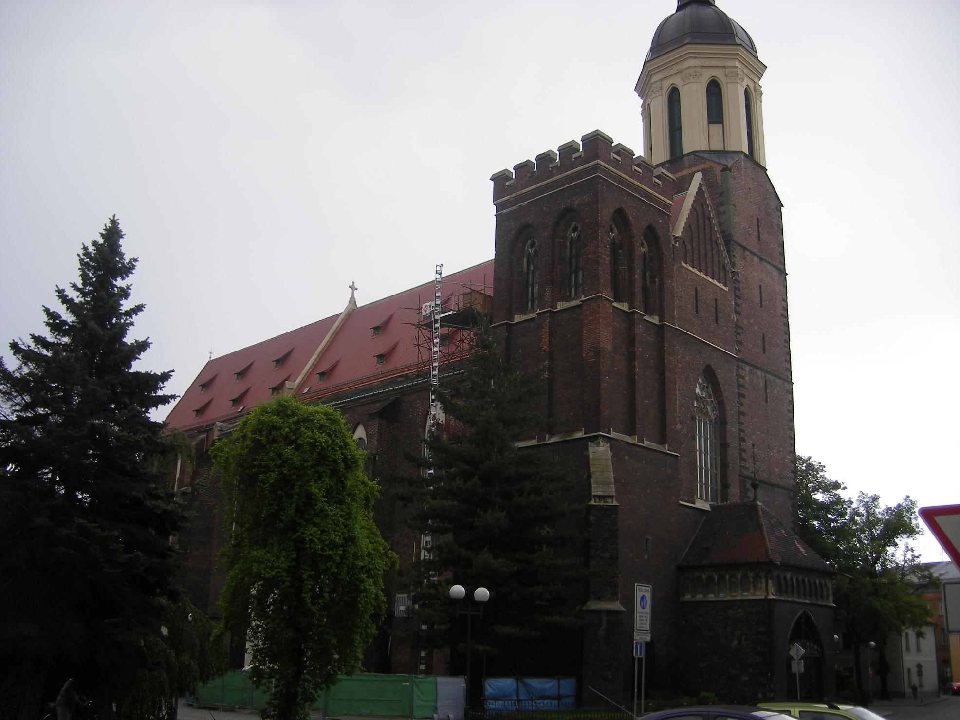 Die römisch-katholische Mariä Himmelfahrt-Konkathedrale in Troppau (Opava)